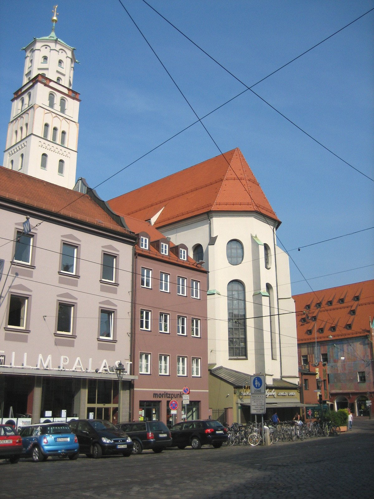 Kirche Sankt Moritz in Augsburg, von der Maximilianstraße aus gesehen